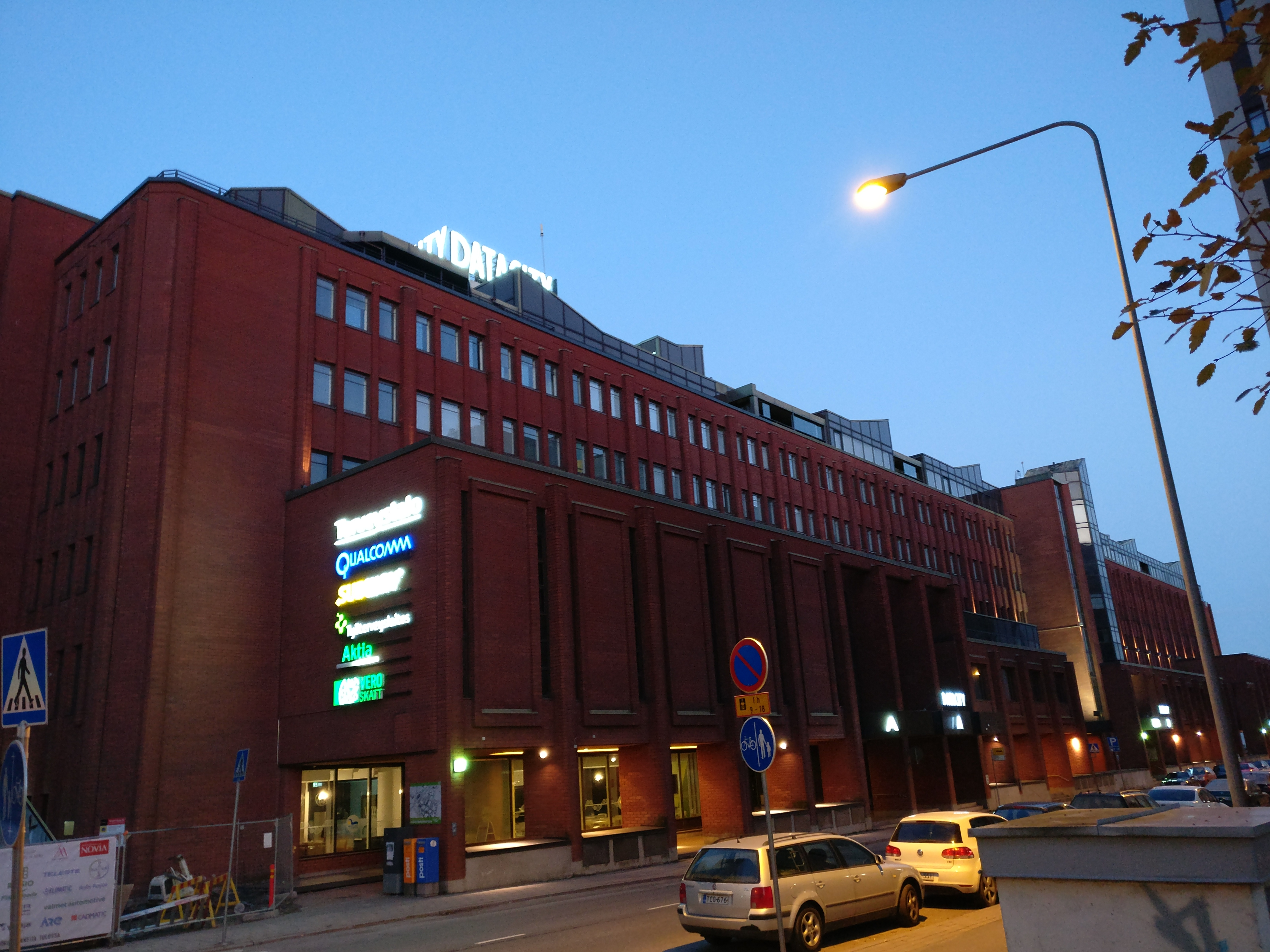 DataCity Kupittaalla, Turussa